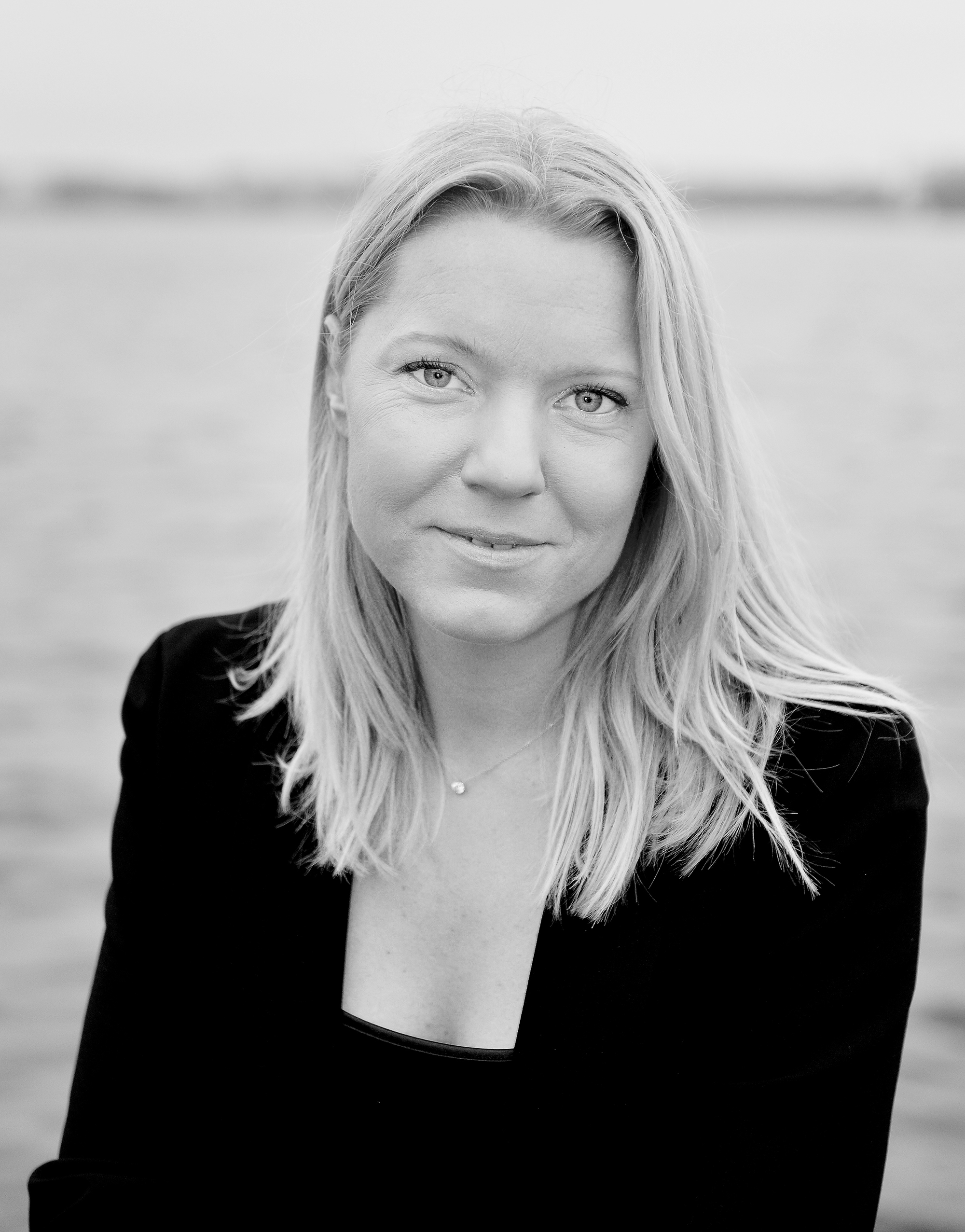 Författaren och journalisten Carina Bergfeldt.